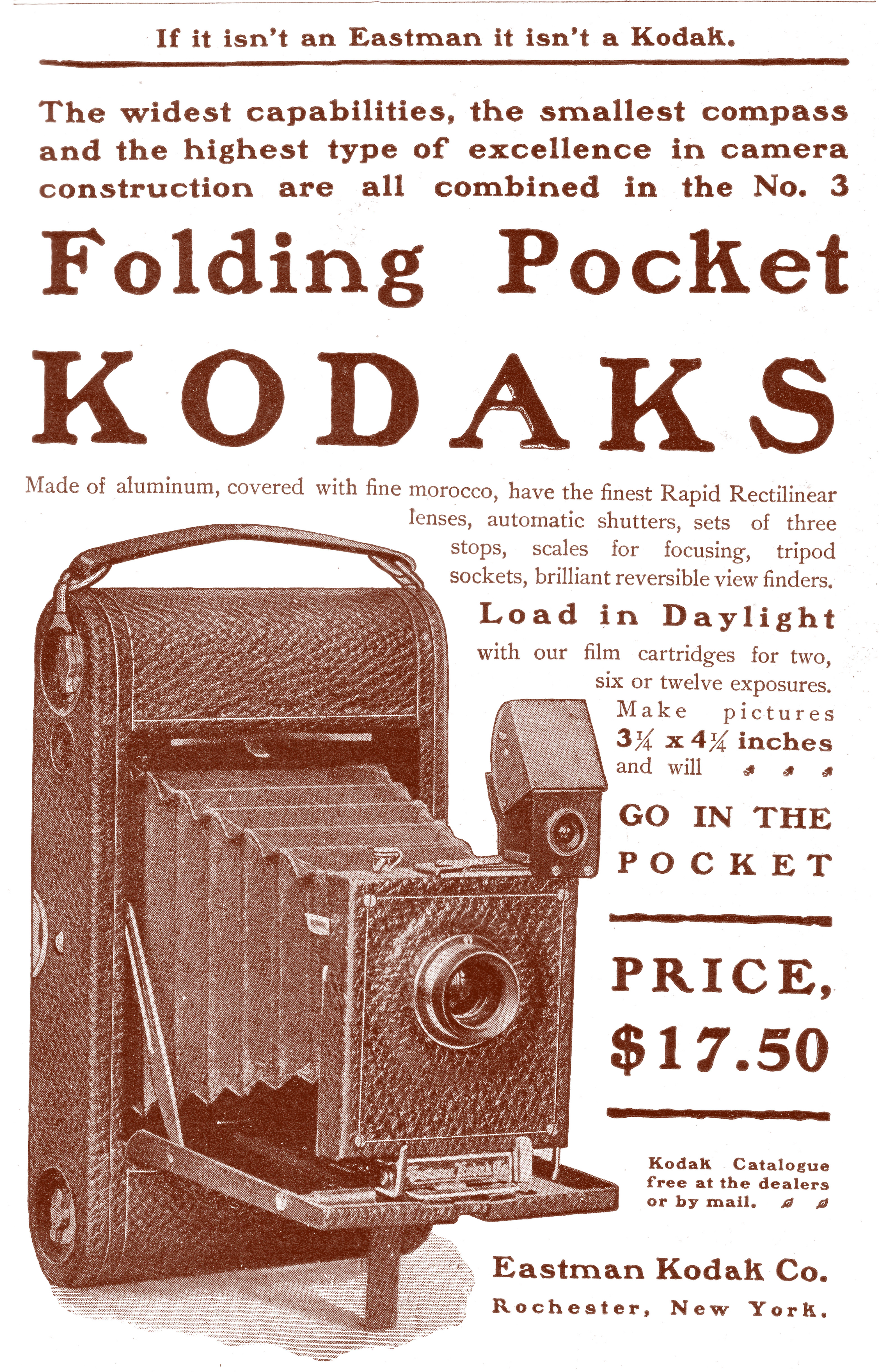 Advertisement for Kodak Folding Pocket Camera 1900